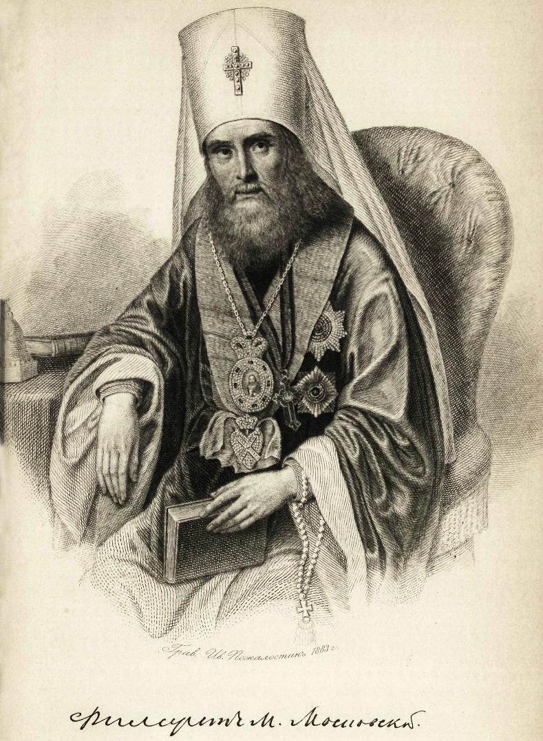 Филарет (Митрополит Московский)